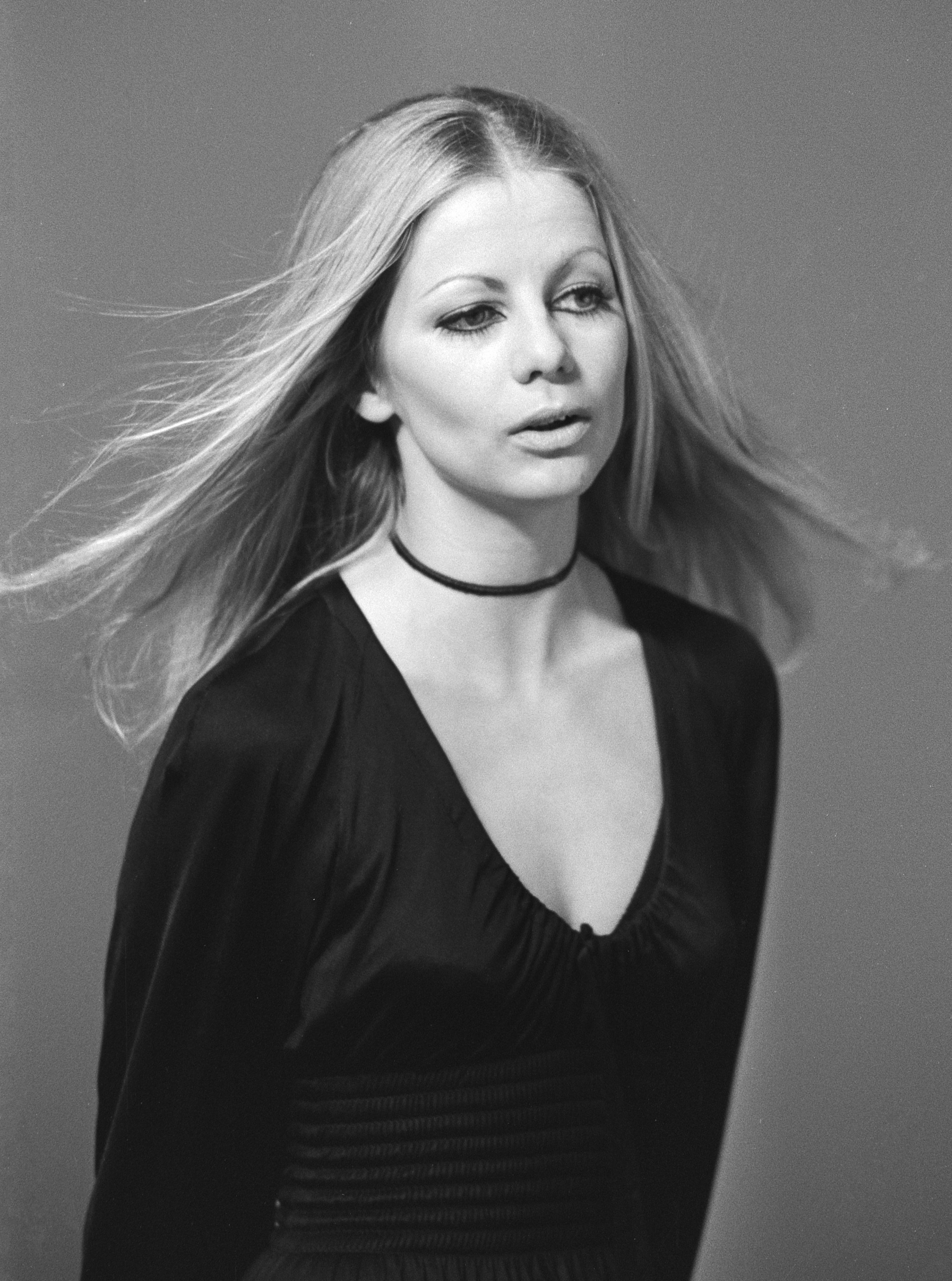 TV-opnamen van AVRO "Het Beste"; Trudy Labij